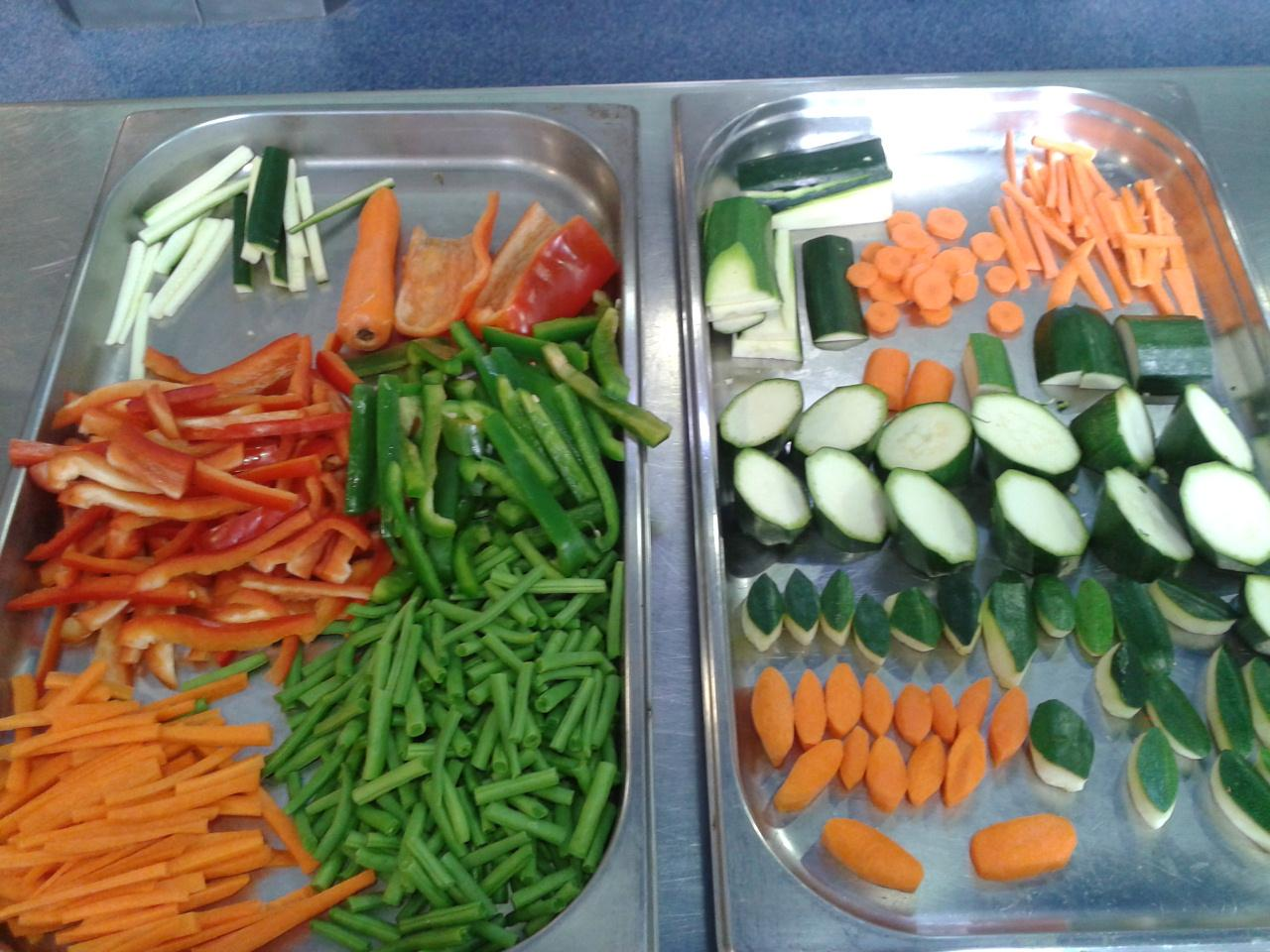 Safata amb verdures tallades amb diferents tipologia de talls. Com ara juliana i tornejat.